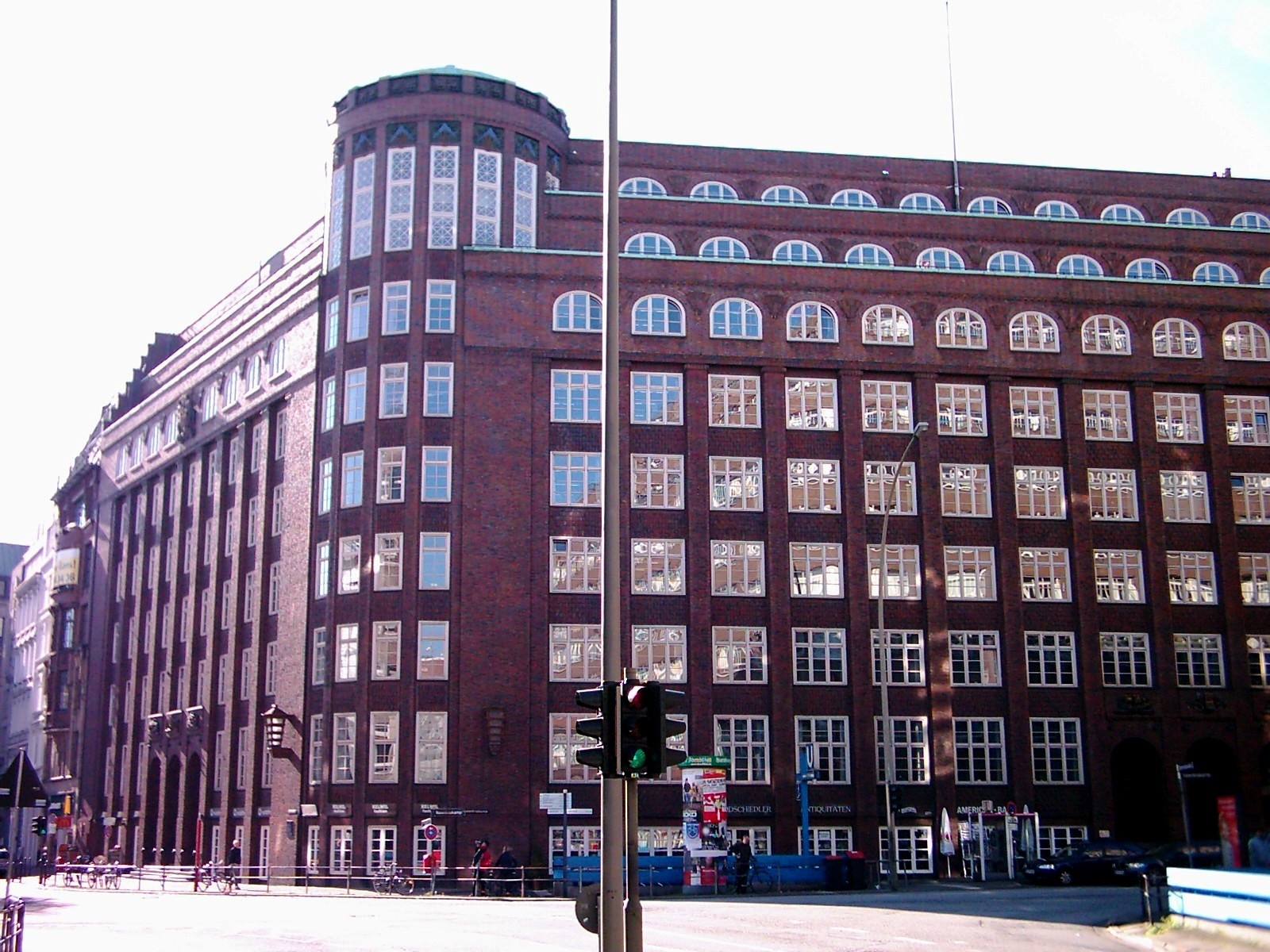 Die Finanzbehörde Hamburg am Gänsemarkt. This is a photograph of an architectural monument.